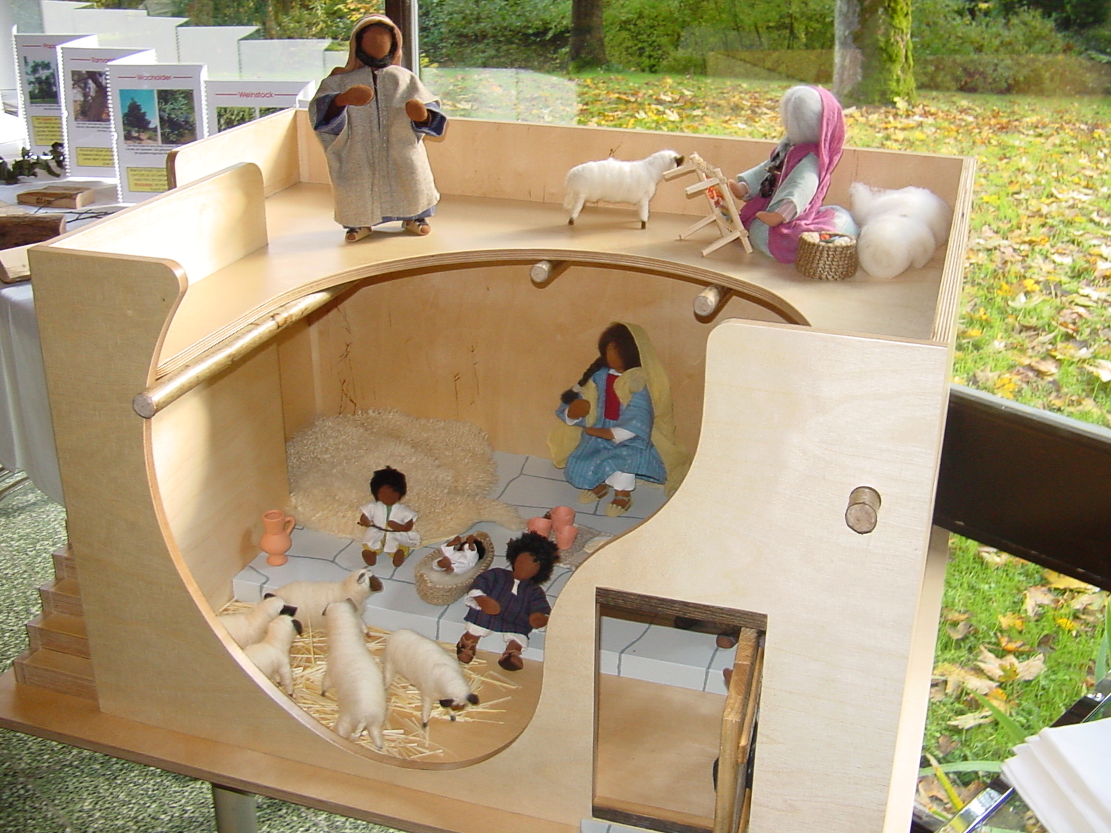 Modellhaus aus der Zeit Jesu mit biblischen Erzählfiguren